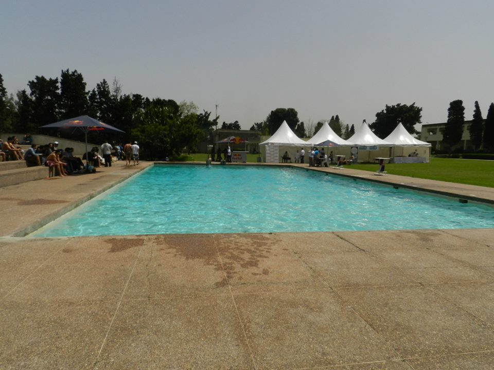 Piscine et vue sur l'espace vert